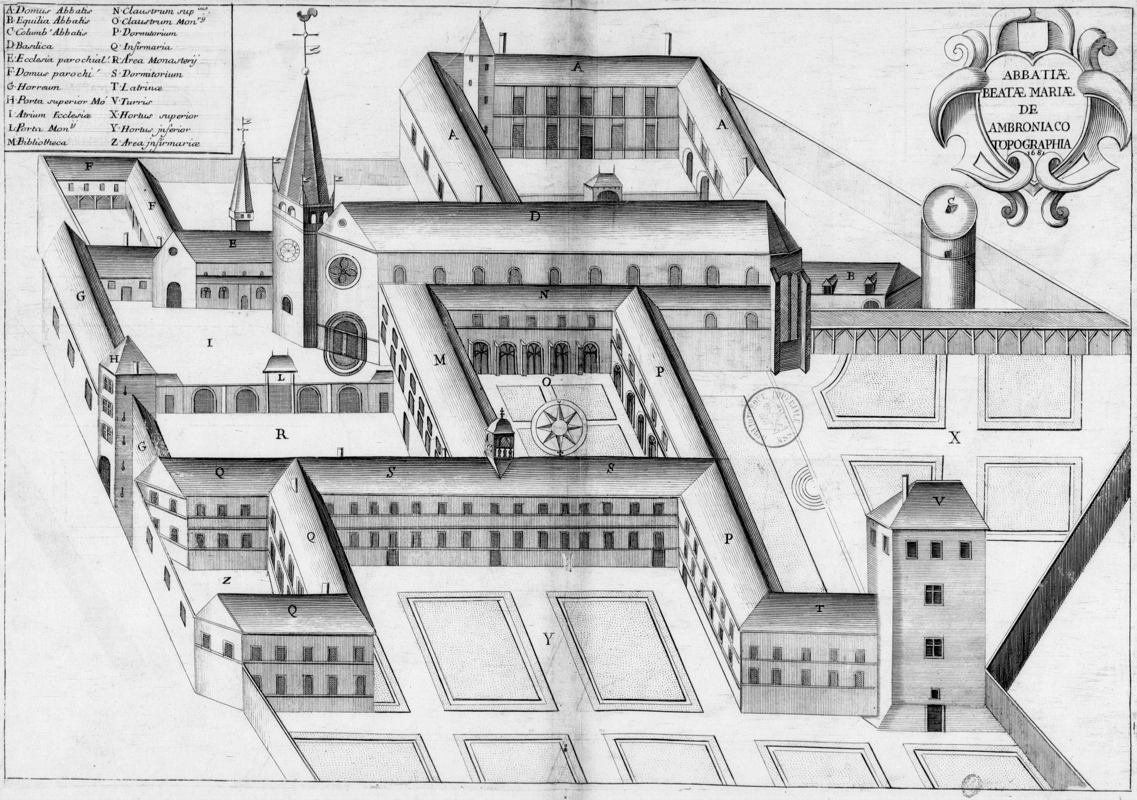 Planche gravée du 17ème siècle représentant l'abbaye d'Ambronay, en France, dans le livre Monasticon Gallicanum.